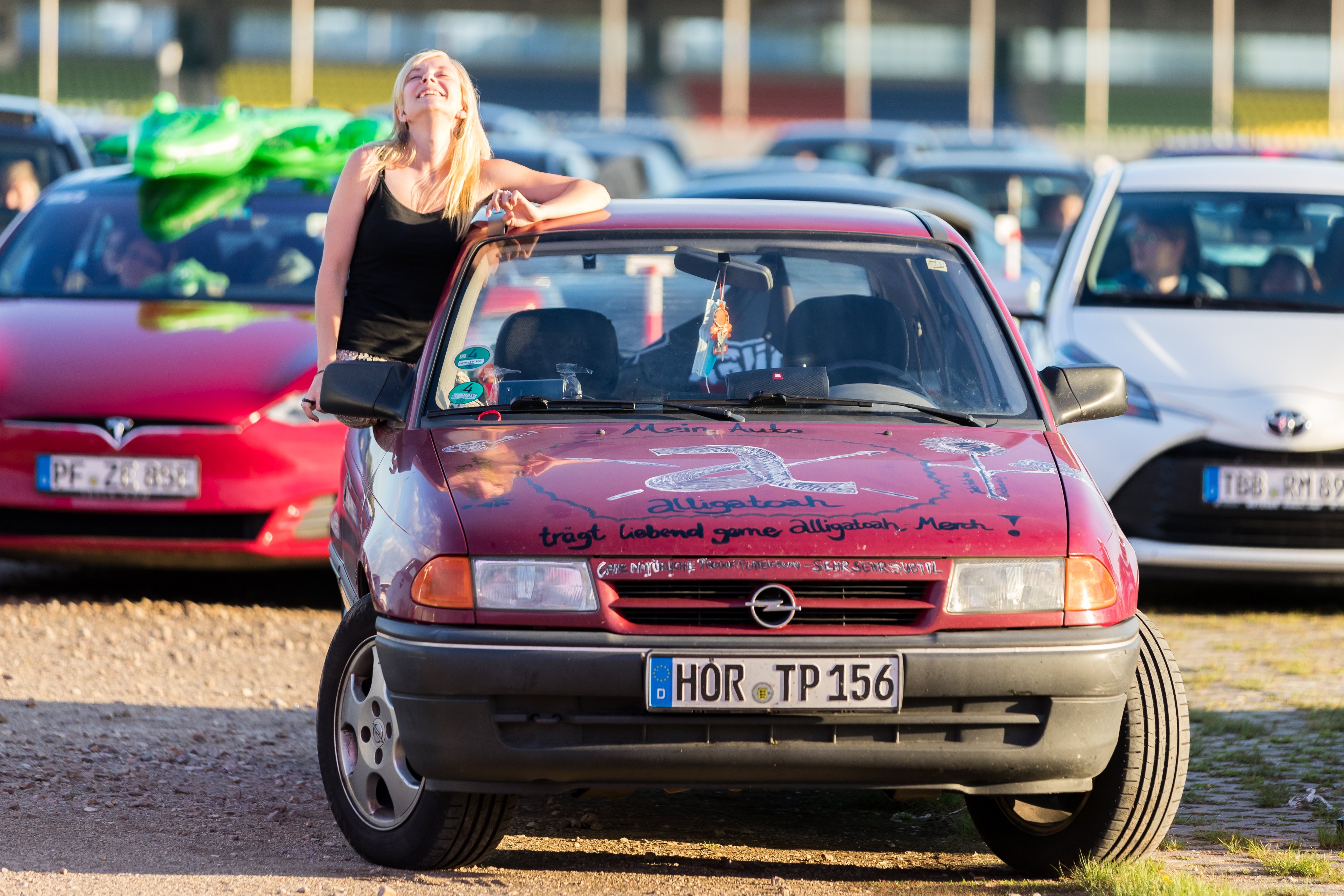 Alligatoah during CARStival at Maimarktgelände, Mannheim, Baden-Württemberg, Germany on 2020-06-20, Photo: Sven Mandel Promotion: go7.ag